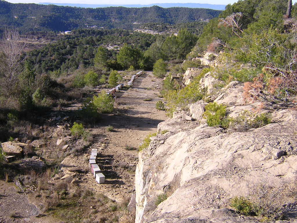 La Pedrera de la Beresma (Monistrol de Calders, Moianès)